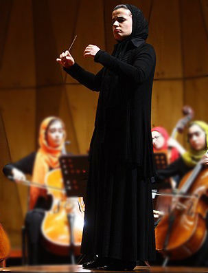 پانیذ فریوسفی رهبری ارکستر زهی هنرستان موسیقی دختران تالار رودکی ۳۰ بهمن ۱۳۹۲